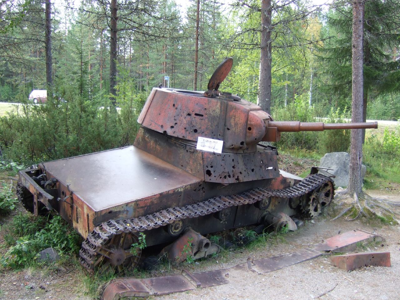 T-26 Model 1939 in Suomussalmi.